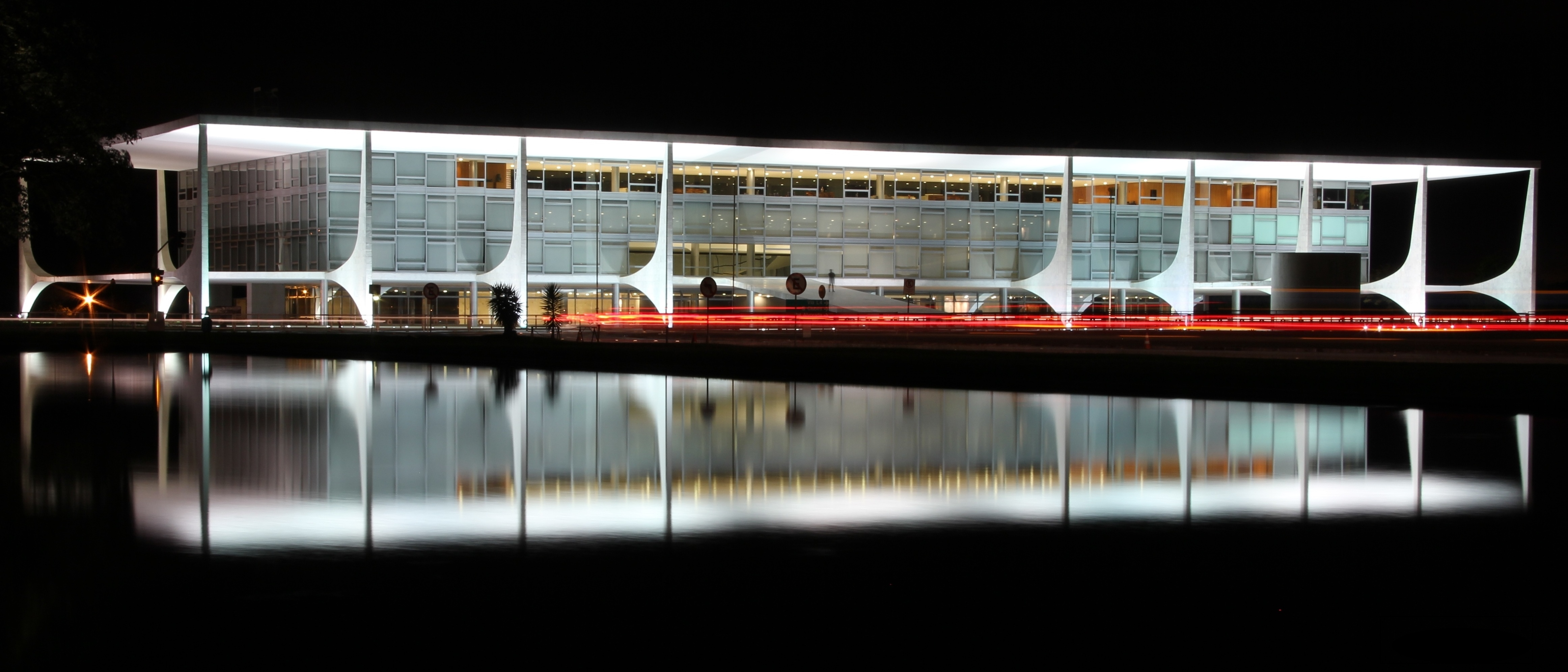 Português do Brasil: Palácio do Planalto e seu reflexo, visualizado na Praça dos Três Poderes, em Brasília.